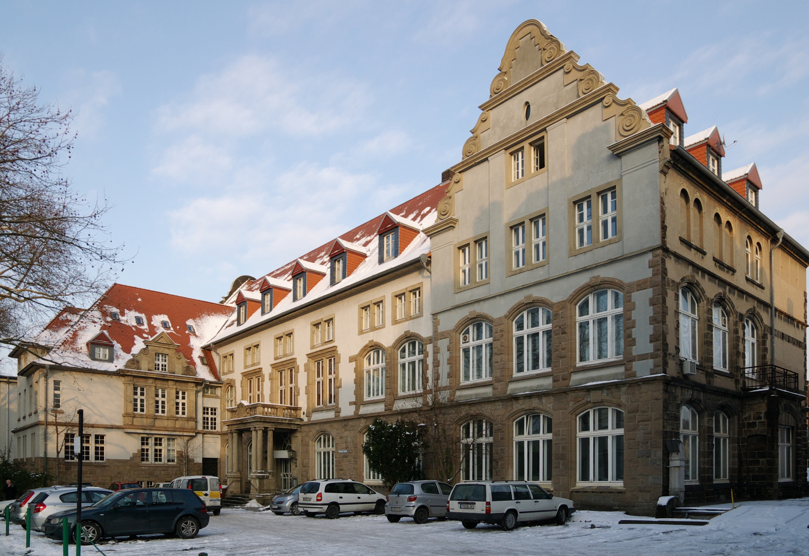 Witten-Annen. UWH. Stockumer Straße 10, ehemaliges Amtshaus